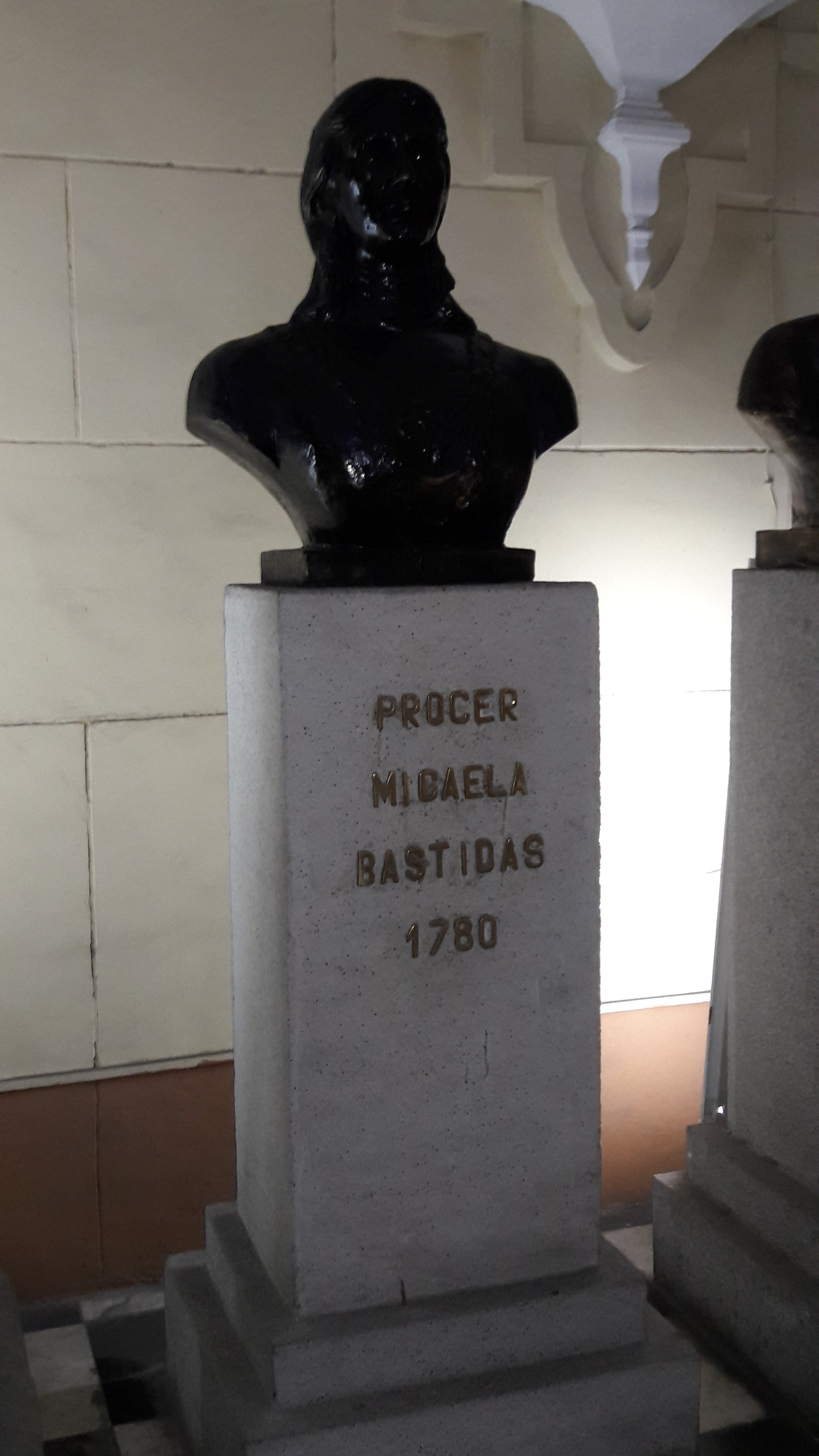 Prócer Micaela Bastidas